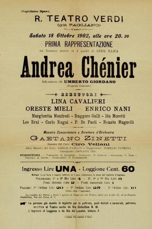 афіша вистави "Андре Шеньє" у театрі Верді